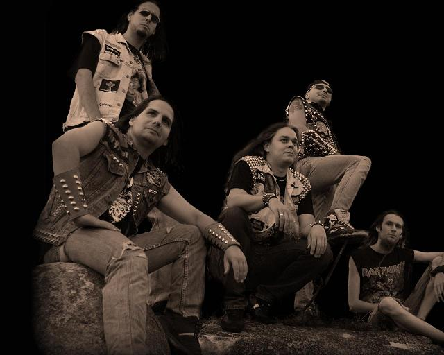 Fotografia skupiny Majster Kat